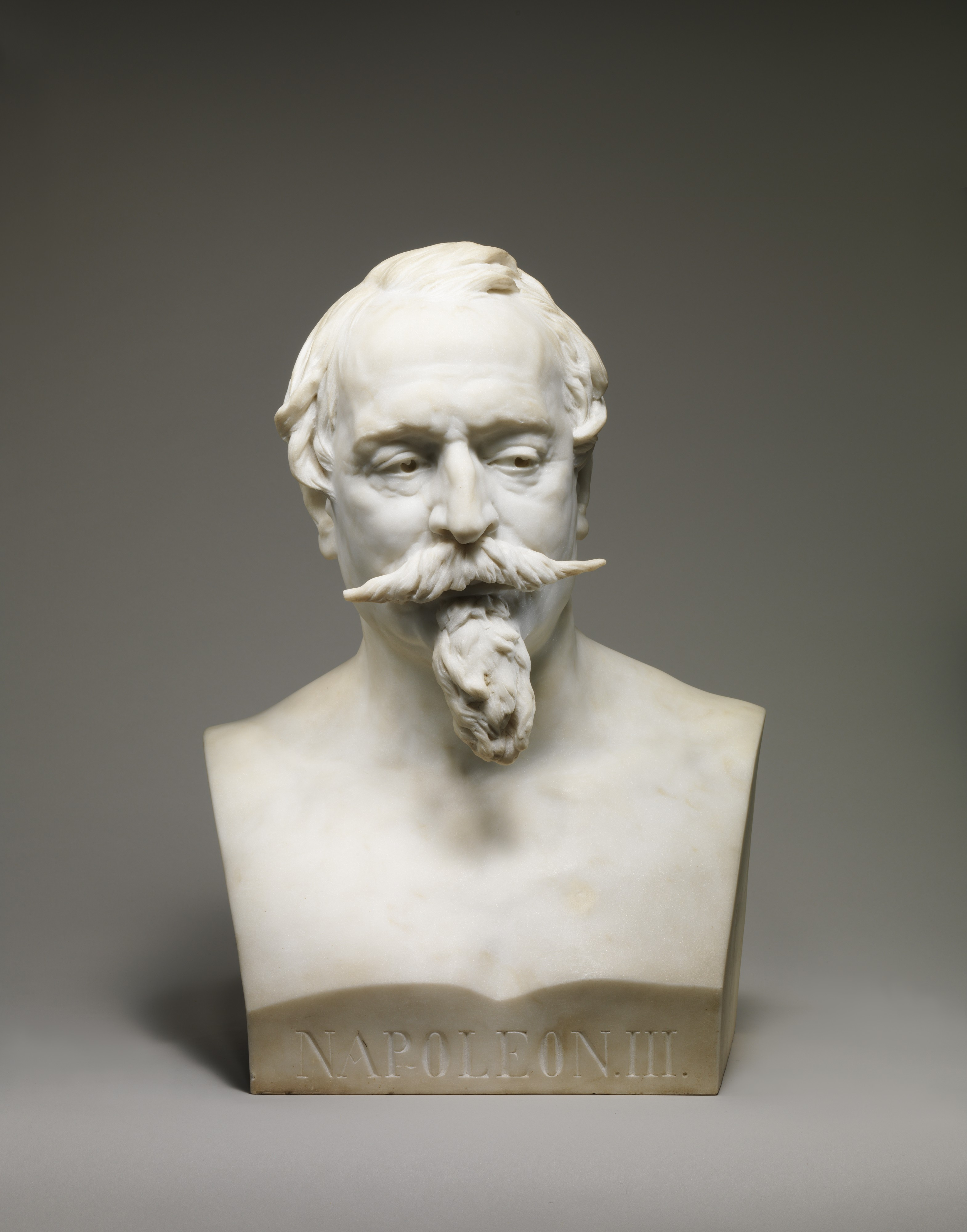 French, Paris; Bust; Sculpture